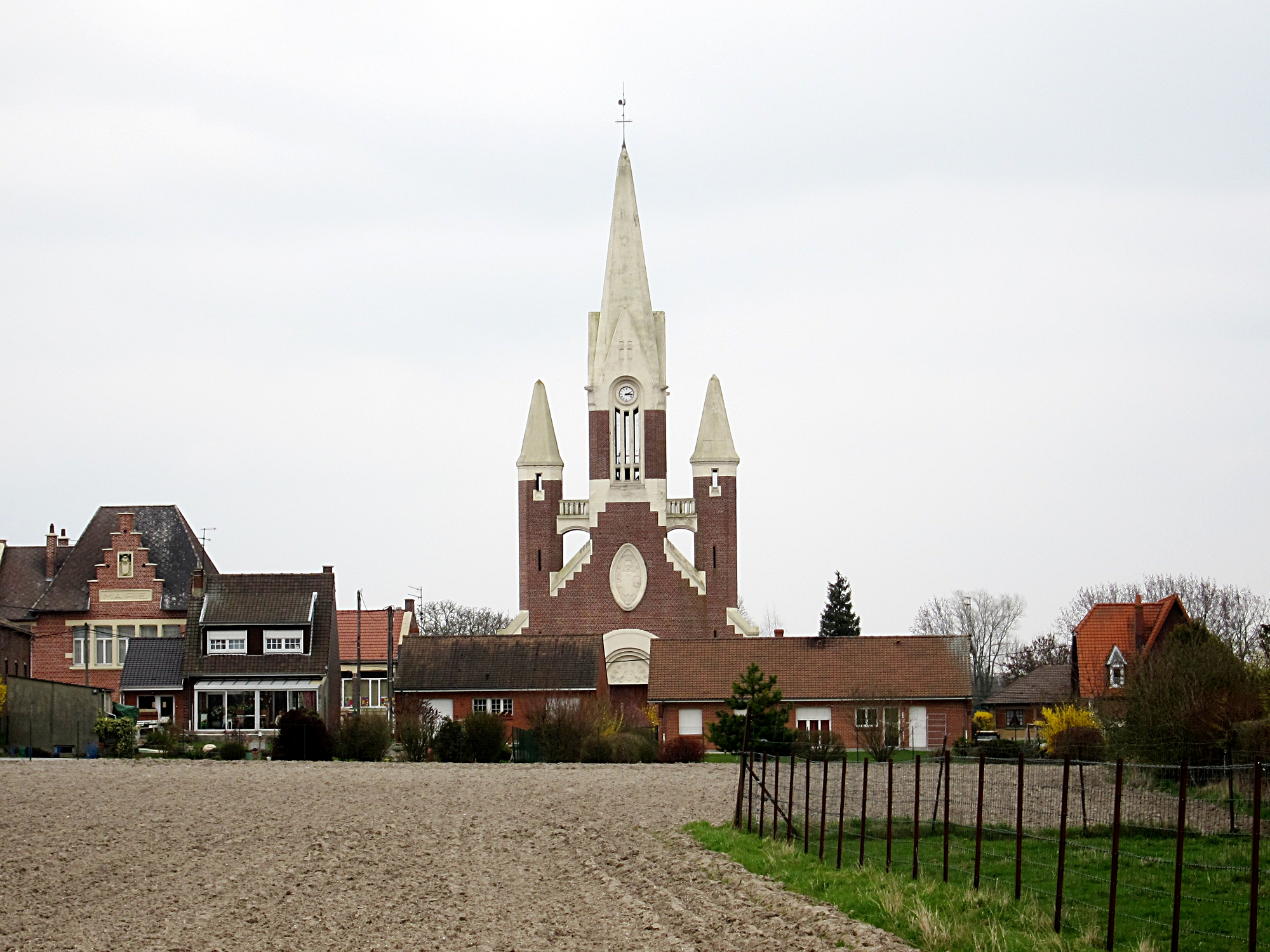 L'église de Fresnes-lès-Montauban (Pas-de-Calais). Elle a été édifiée par Charles Demory et sa soeur Félicité Demory, de 1876 à 1877. Elle comporte 3 clochers qui correspondent aux trois communes de Fresnes, Meauville et Montauban.